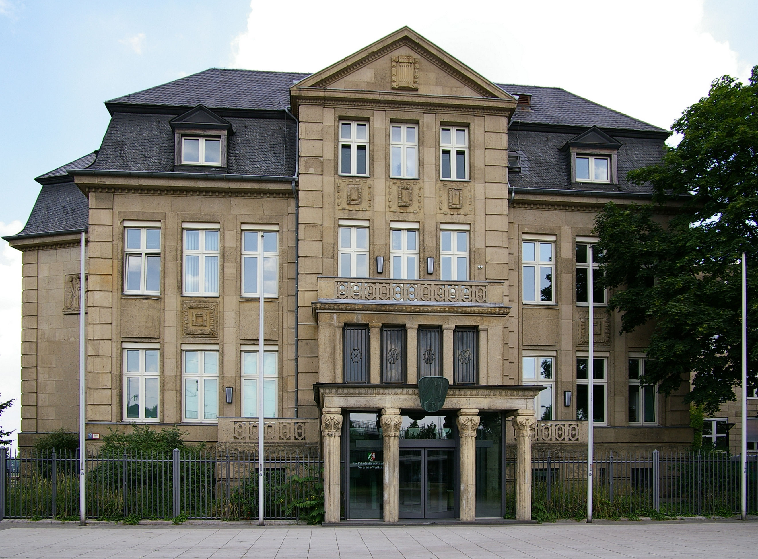 Genehmigung: GFDL (Version 1.2, November 2002), kein wie auch immer geartetes "Gentlemen-Agreement". Bildnutzung ohne Einhaltung der Bestimmungen der GFDL ist kostenpflichtig und wird vom Rechteinhaber in Rechnung gestellt. Zweitlizensierung ggf. auch unentgeltlich auf Anfrage. Es gelten die AGB. Motiv: Präsidentensitz in Düsseldorf (Villa Horion, Arch. Hermann vom Endt)